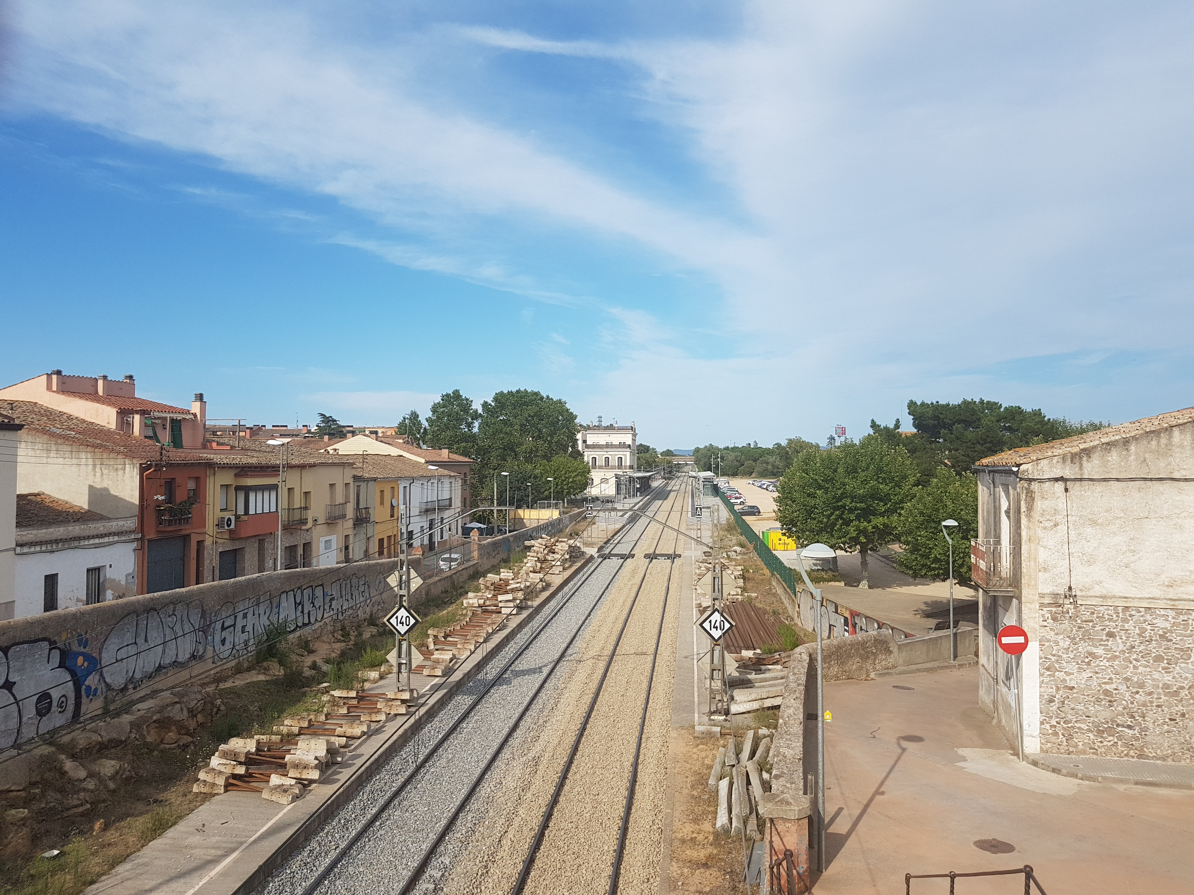 Línia de ferrocarril Barcelona-Girona-Portbou per l'estació de Sils.